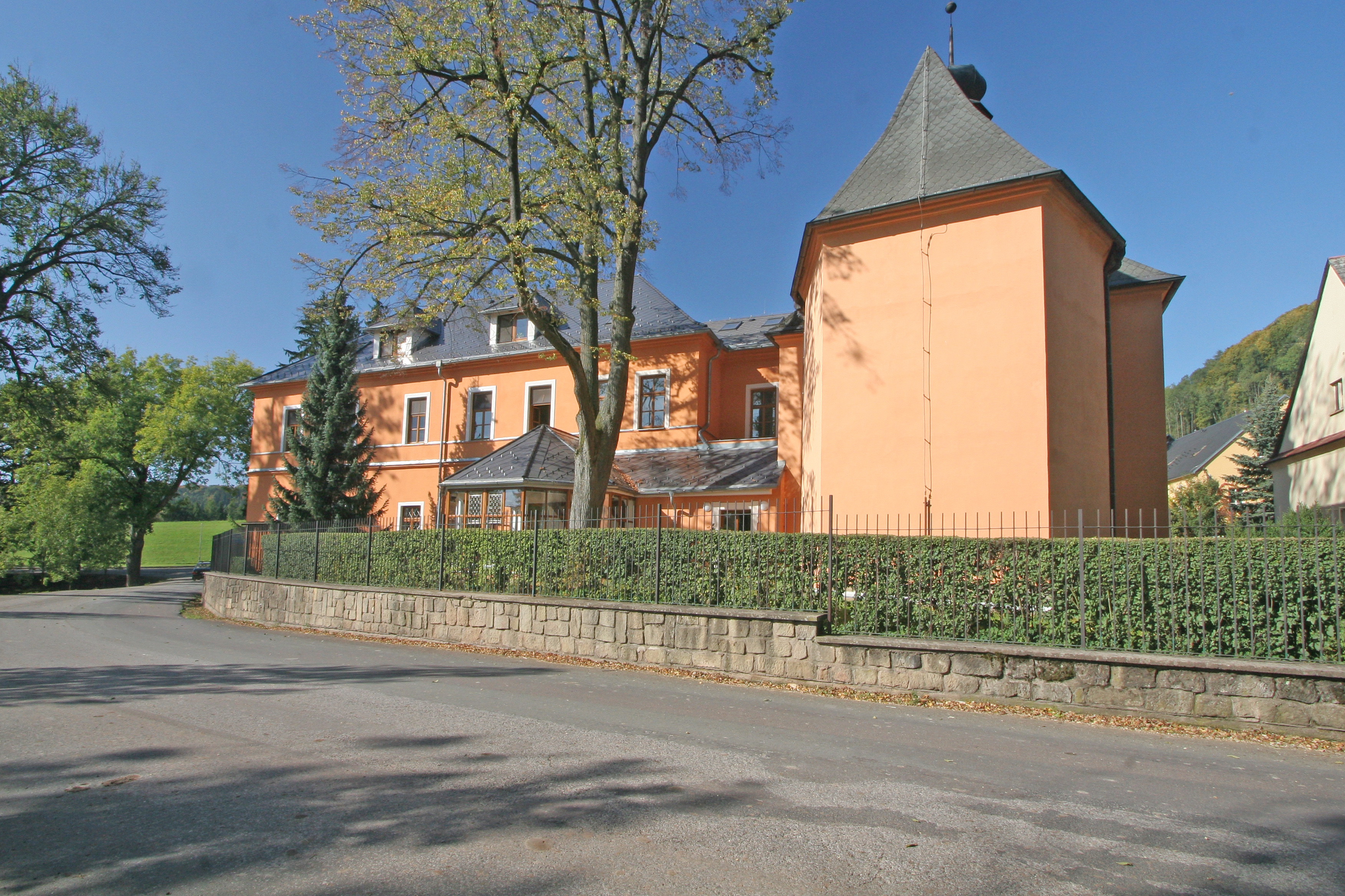 Zámek Žampach, Žampach 1